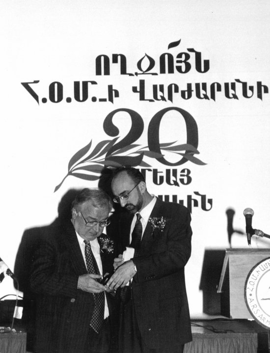 Markar Saraphanian and Raffi Doudaklian in Toronto.